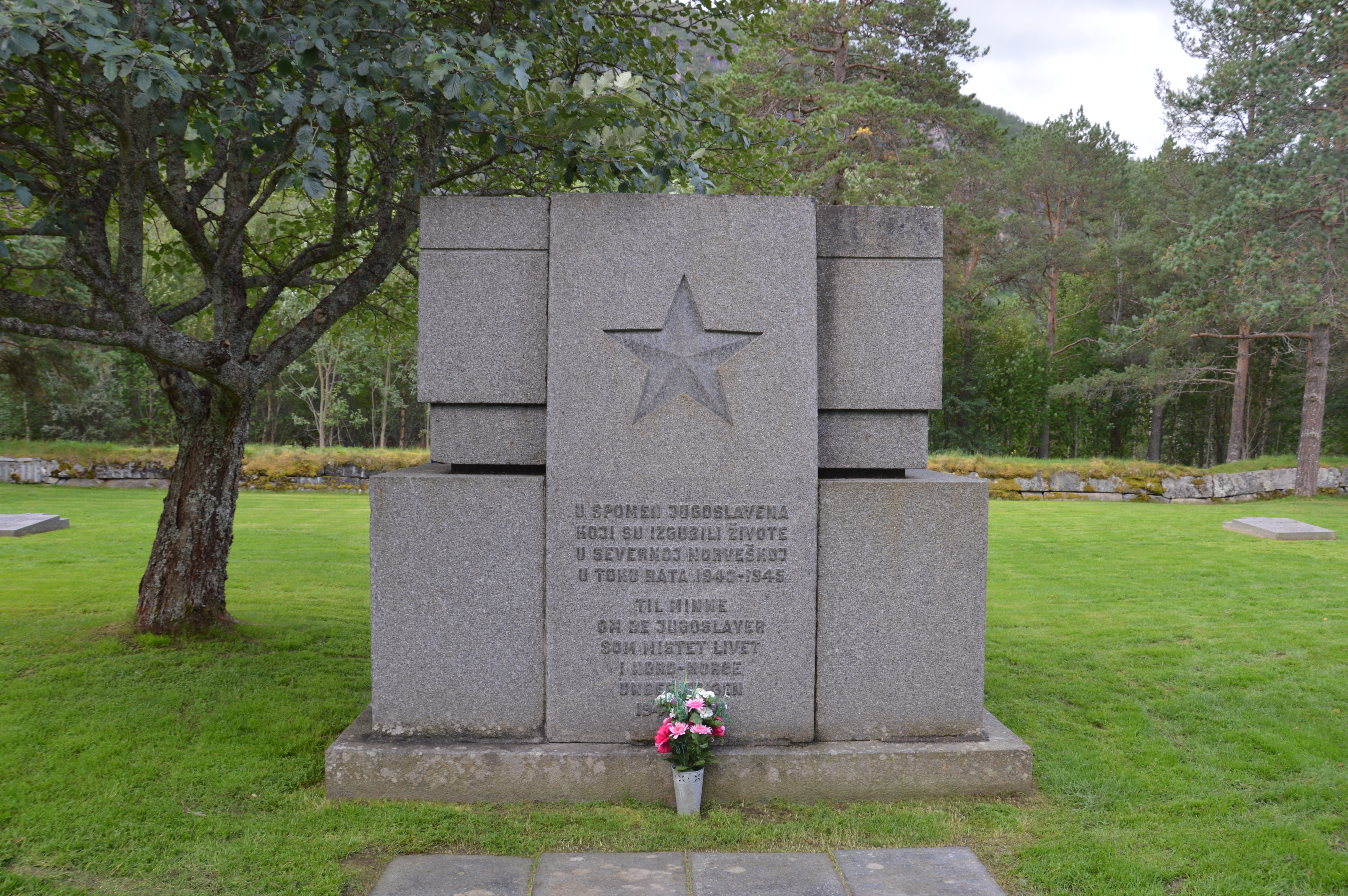 Churchyard for in Botn, Saltdal, Norway, for Jugoslav war prisoners who worked on the road